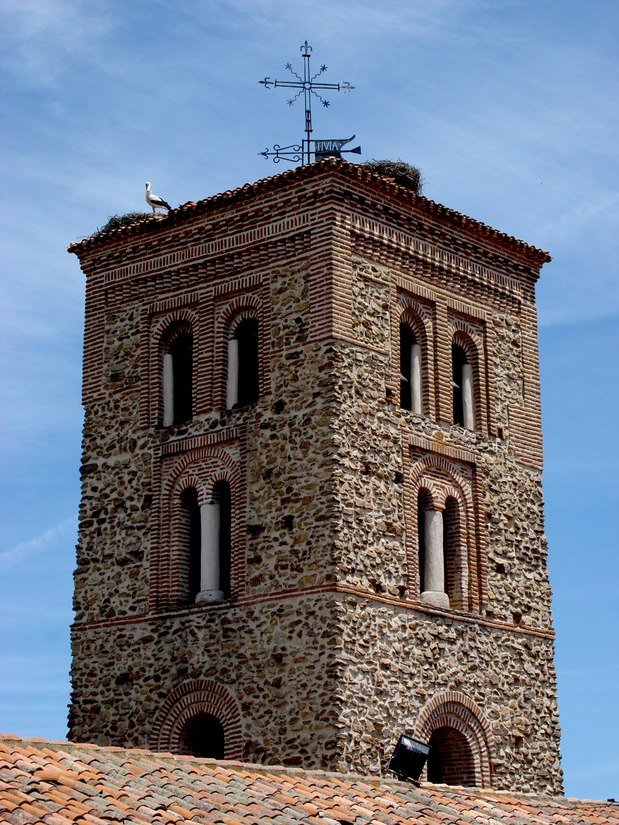 La torre, de gran altura y esbeltez, aloja en lo alto el campanario, y los elementos mudéjares enmarcan sus veinte vanos, cinco en cada cara.